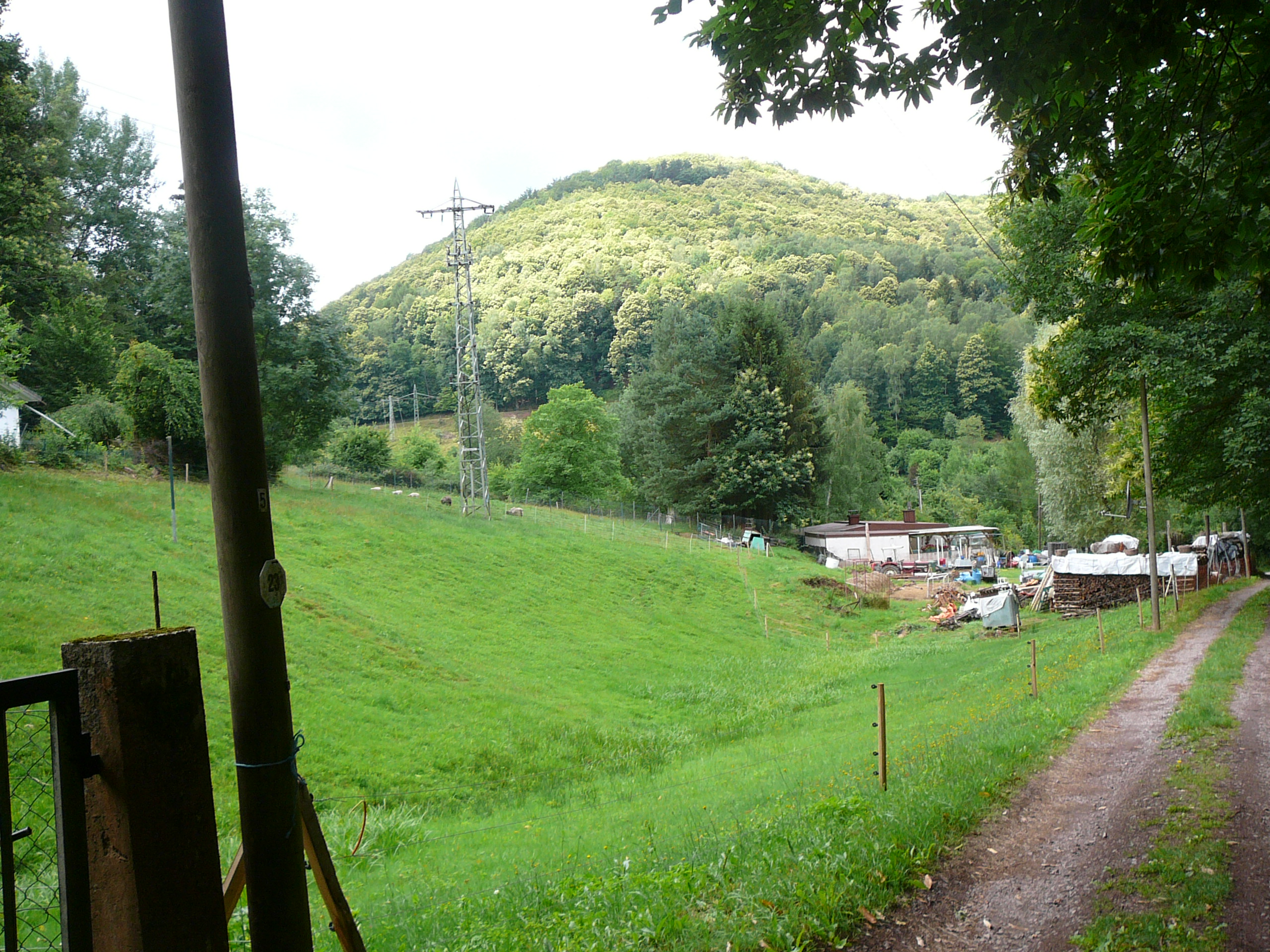 Blick ins untere Holpertal Richtung Dernbach und Burgberg der Ruine Ramburg